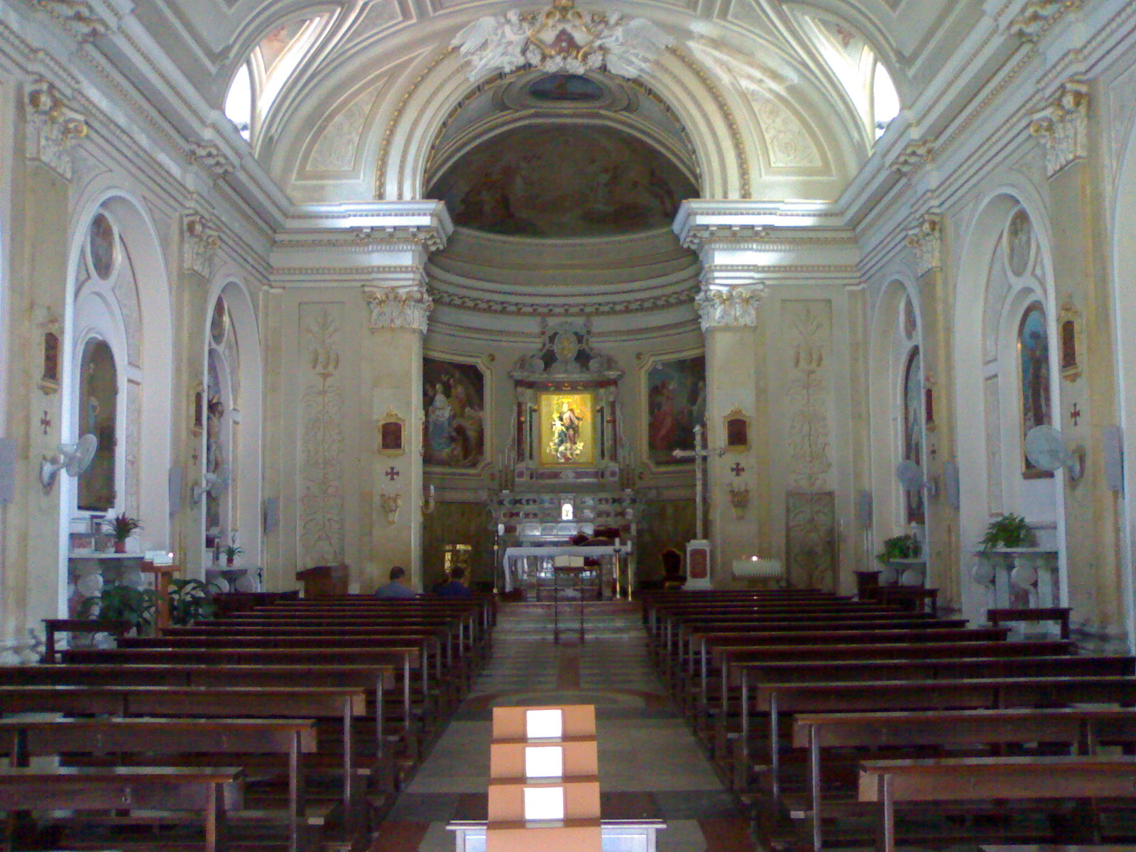 Interno del Santuario di Maria Santissima del Carmelo di Palmi